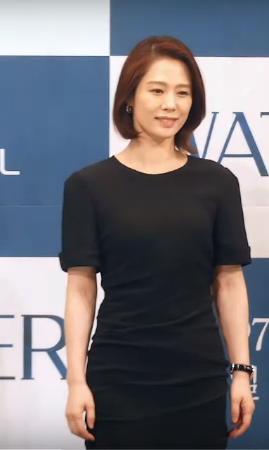 2일 오후 서울시 강남구 논현동 임피리얼팰리스 서울에서 OCN 새 토일드라마 '왓쳐(WATCHER)' 제작발표회가 열려 배우 한석규, 서강준, 김현주, 허성태, 박주희가 참석해 포토타임을 갖고 있다.